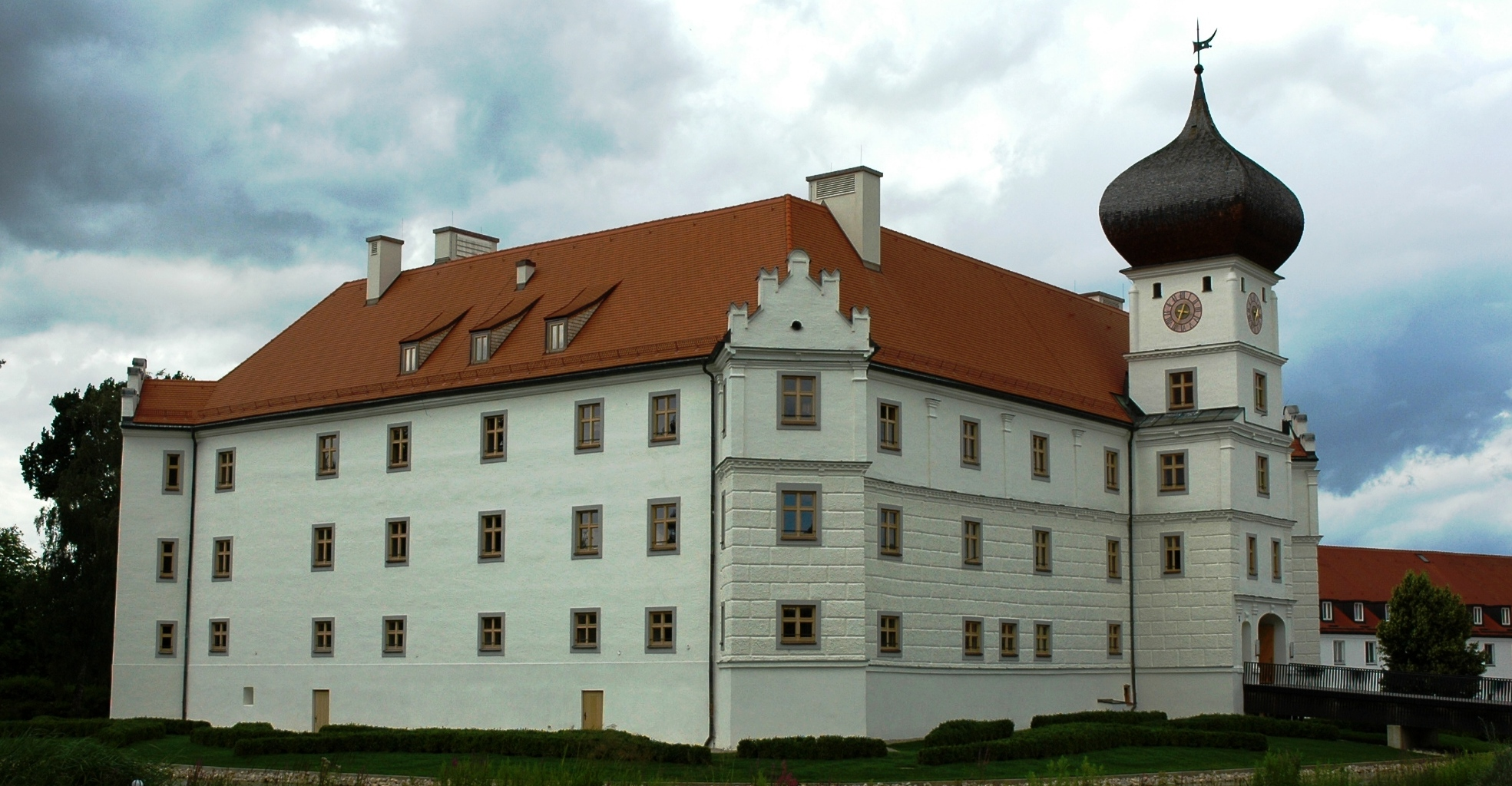 Schloss Hohenkammer von Südosten gesehen.